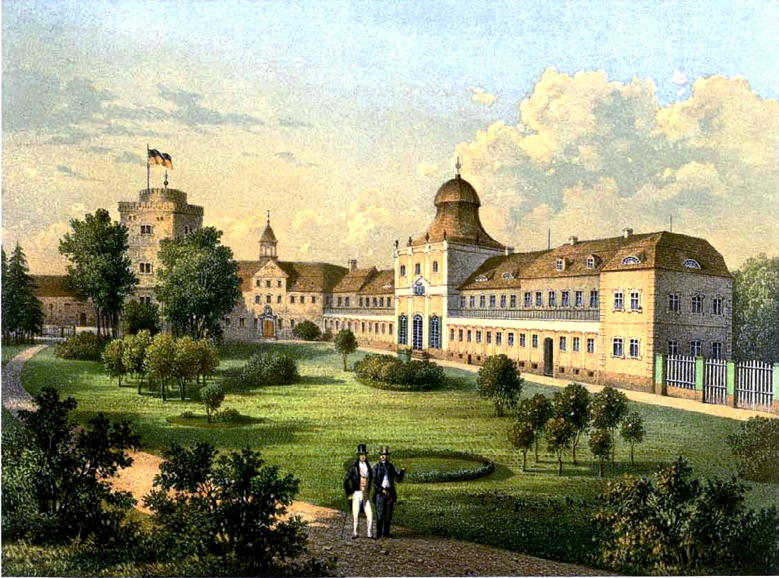 Schloss Trachenberg, Kreis Militsch Trachenberg